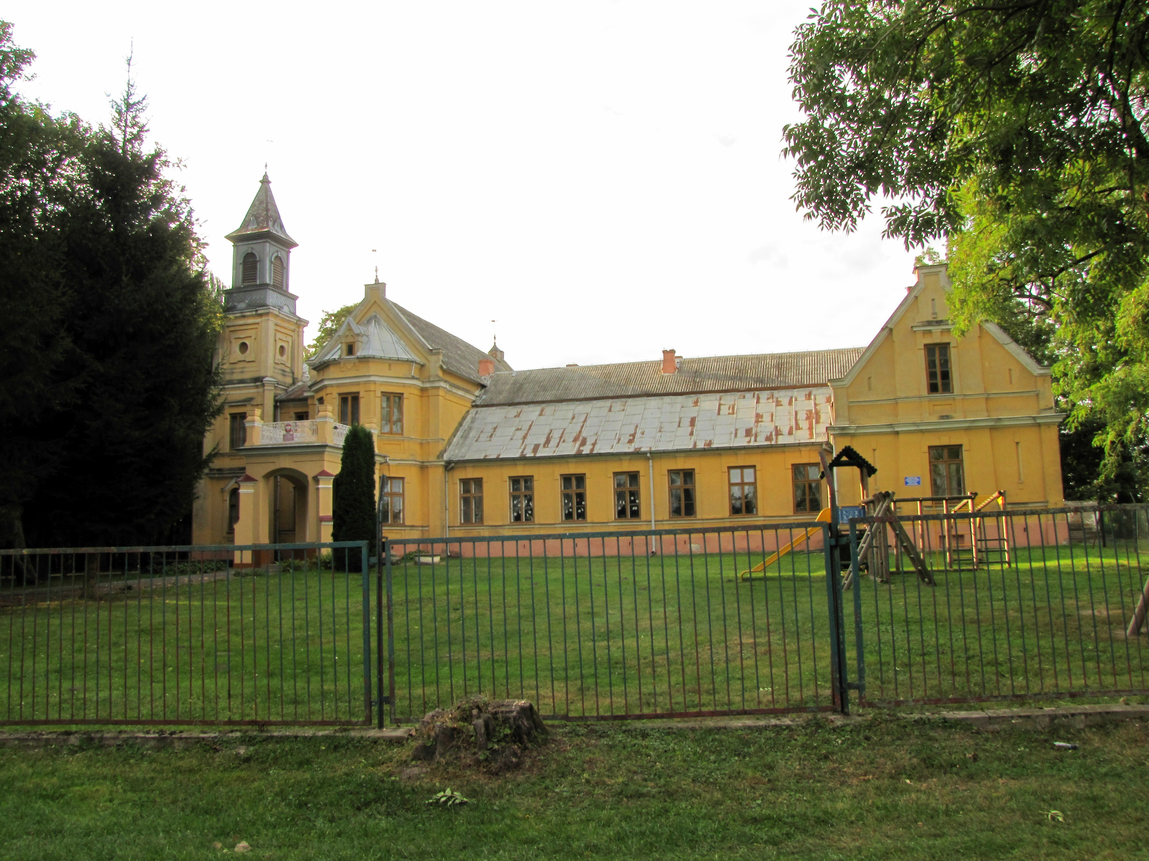 Zespół pałacowy Branica Radzyńska